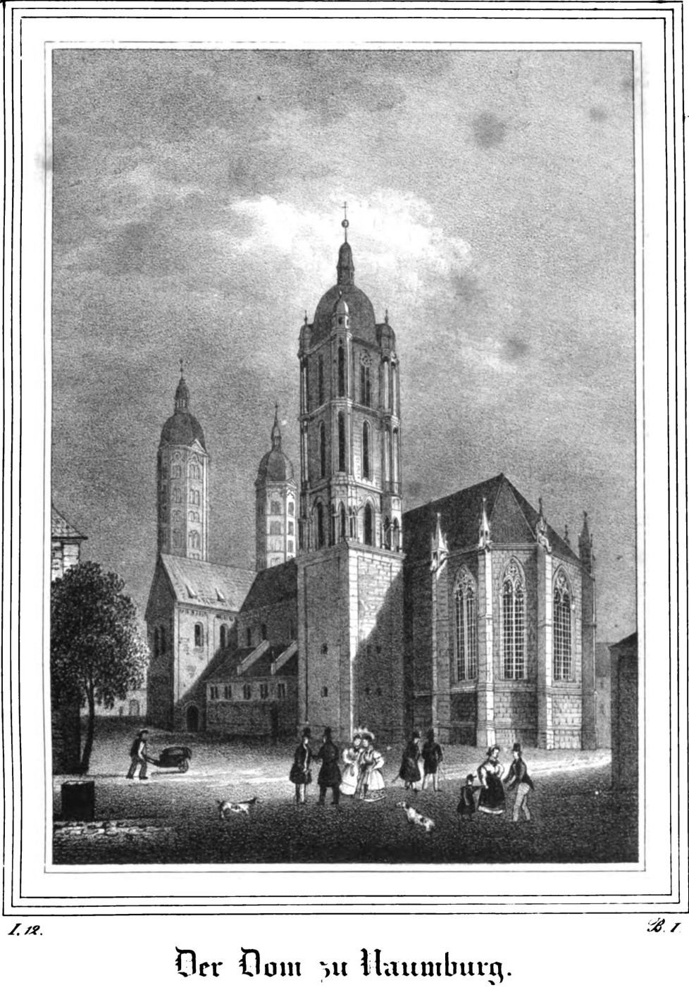 Saxonia Museum für saechsische Vaterlandskunde. Band 1. Dresden: Pietzsch und Comp. Siehe File:Saxonia Museum für saechsische Vaterlandskunde I.djvu